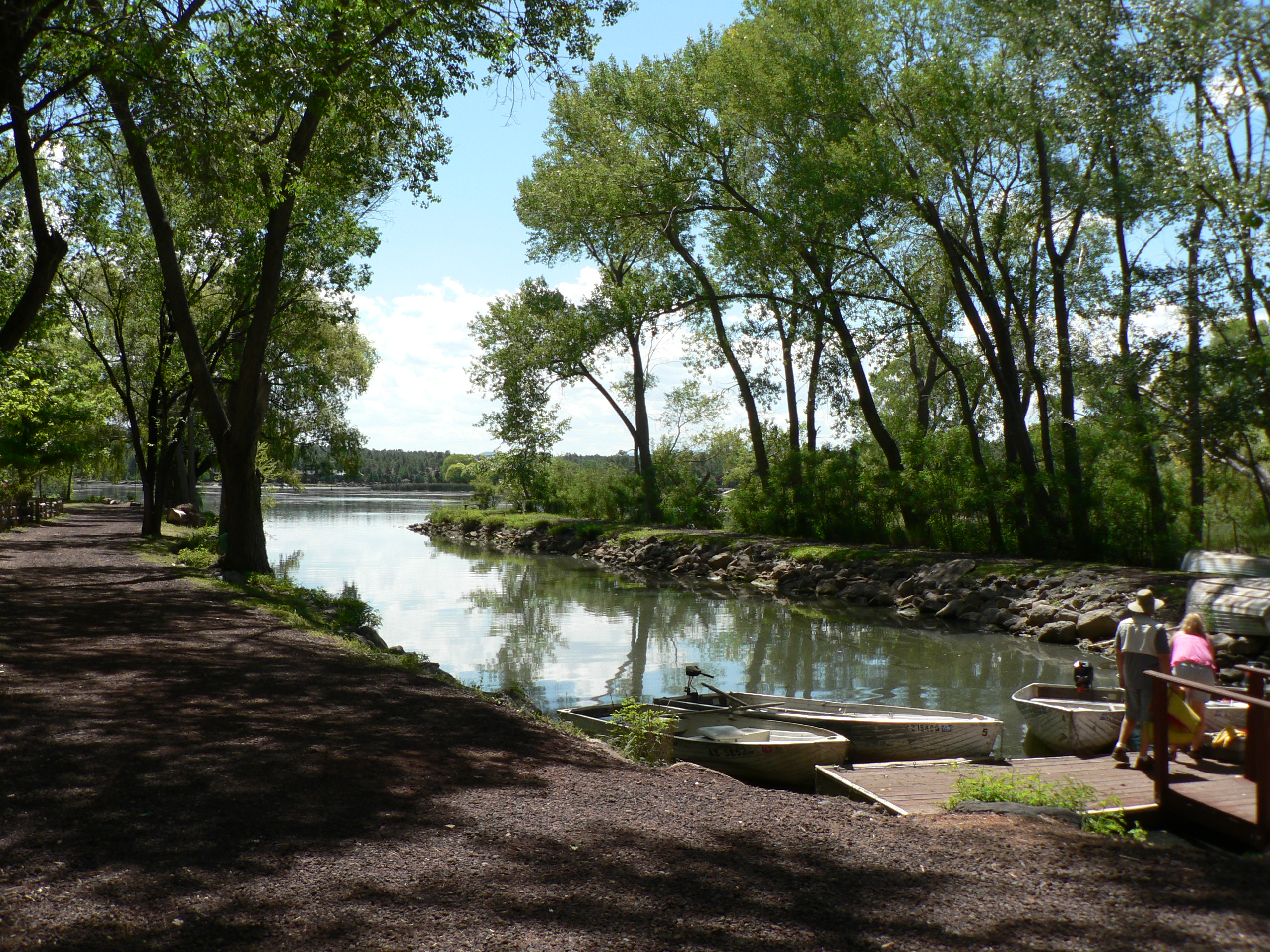 Lakeside, Az